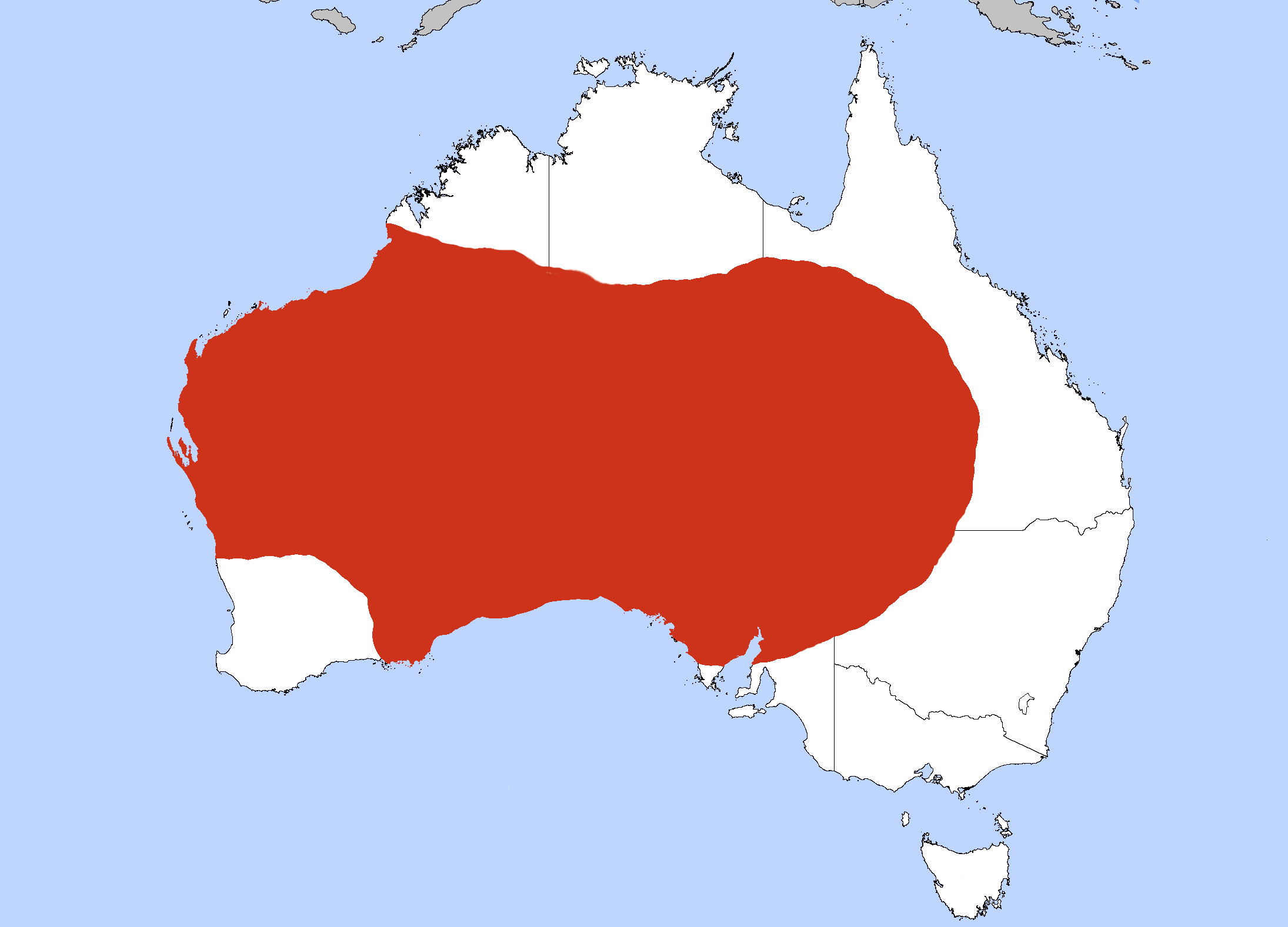 Carte de distribution du kangourou roux en australie